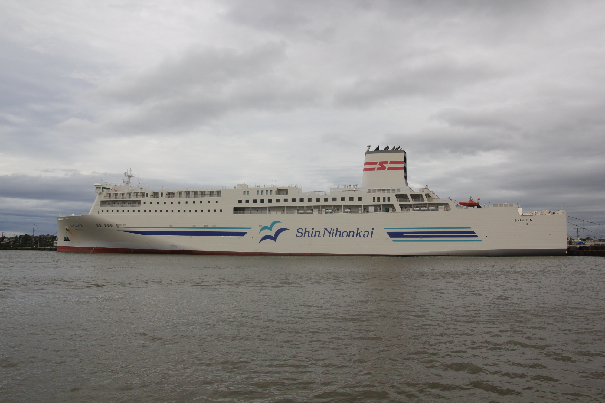 スクラバー搭載改造後のらべんだあ